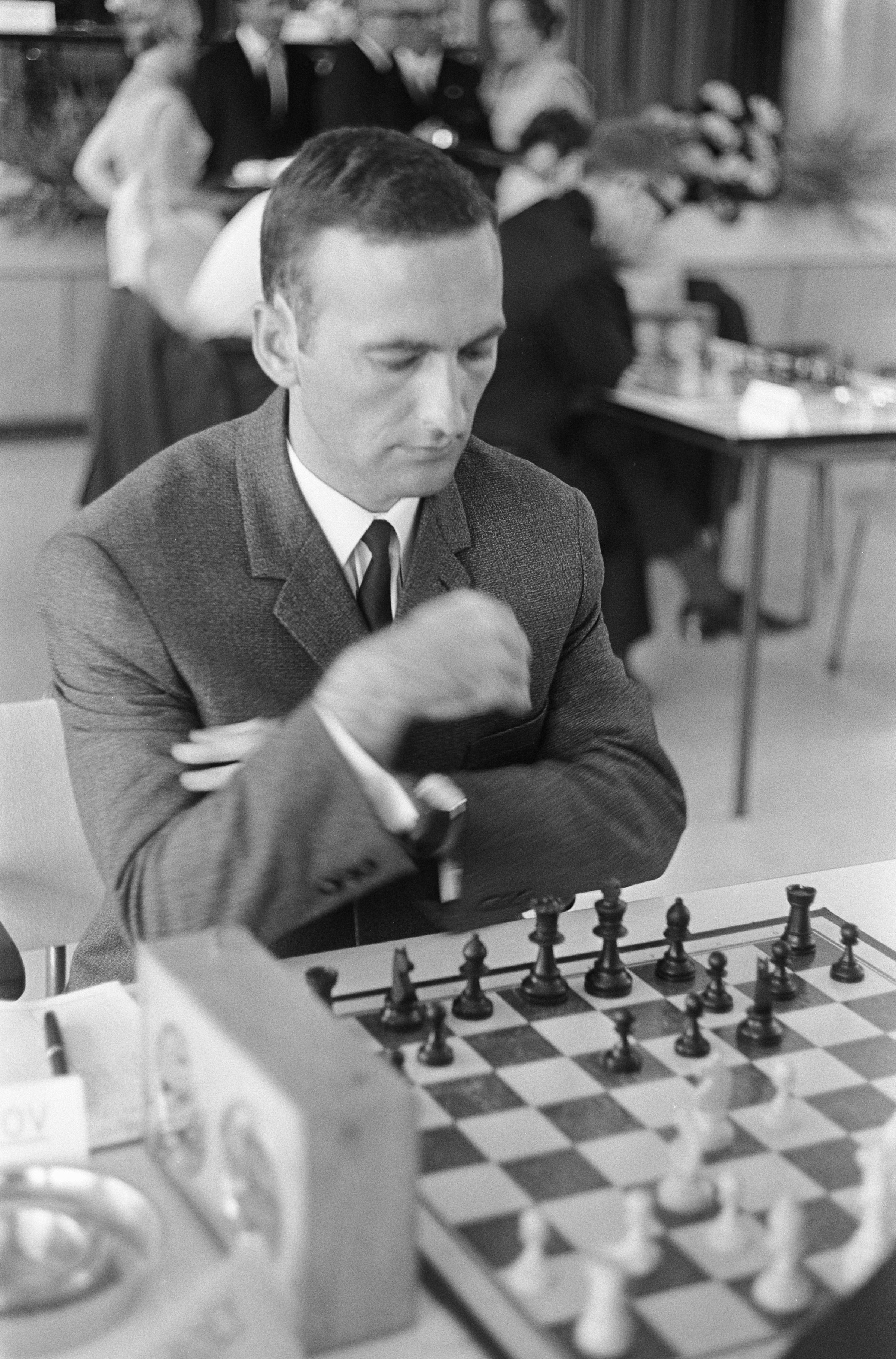 Collectie / Archief : Fotocollectie Anefo Reportage / Serie : Fédération Internationale des Échecs (FIDE) -Zone schaaktoernooi 1966 in de kantine van 'De Nederlanden van 1845' te Den Haag Beschrijving : De Bulgaar Georgi Tringov aan het schaakbord (There is a mistake at source page - the picture shows Georgi Tringov, not Istvan Bilek. The last two letters of Tringov's name are visible (on the table, left) Annotatie : randnummers negatiefstrook: nummer 23 en 24 Tringov Datum : 13 september 1966 Locatie : Den Haag, Zuid-Holland Trefwoorden : schaken, sport, toernooien Persoonsnaam : Tringov Fotograaf : Fotograaf Onbekend / Anefo Auteursrechthebbende : Nationaal Archief Materiaalsoort : Negatief (zwart/wit) Nummer archiefinventaris : bekijk toegang 2.24.01.05 Bestanddeelnummer : 919-5573